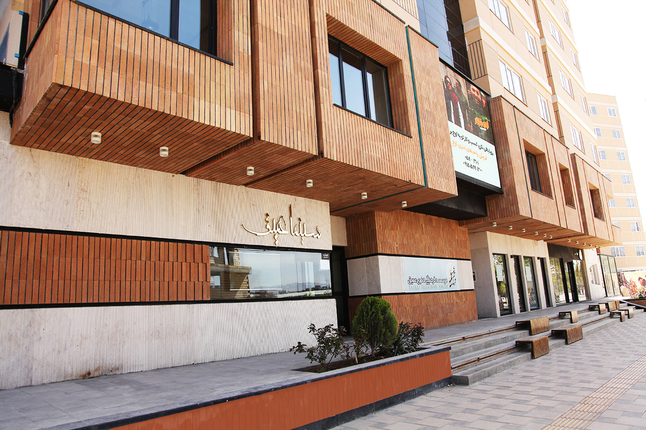 تصویری از بیرون سینما عمیق و مجتمع اوج